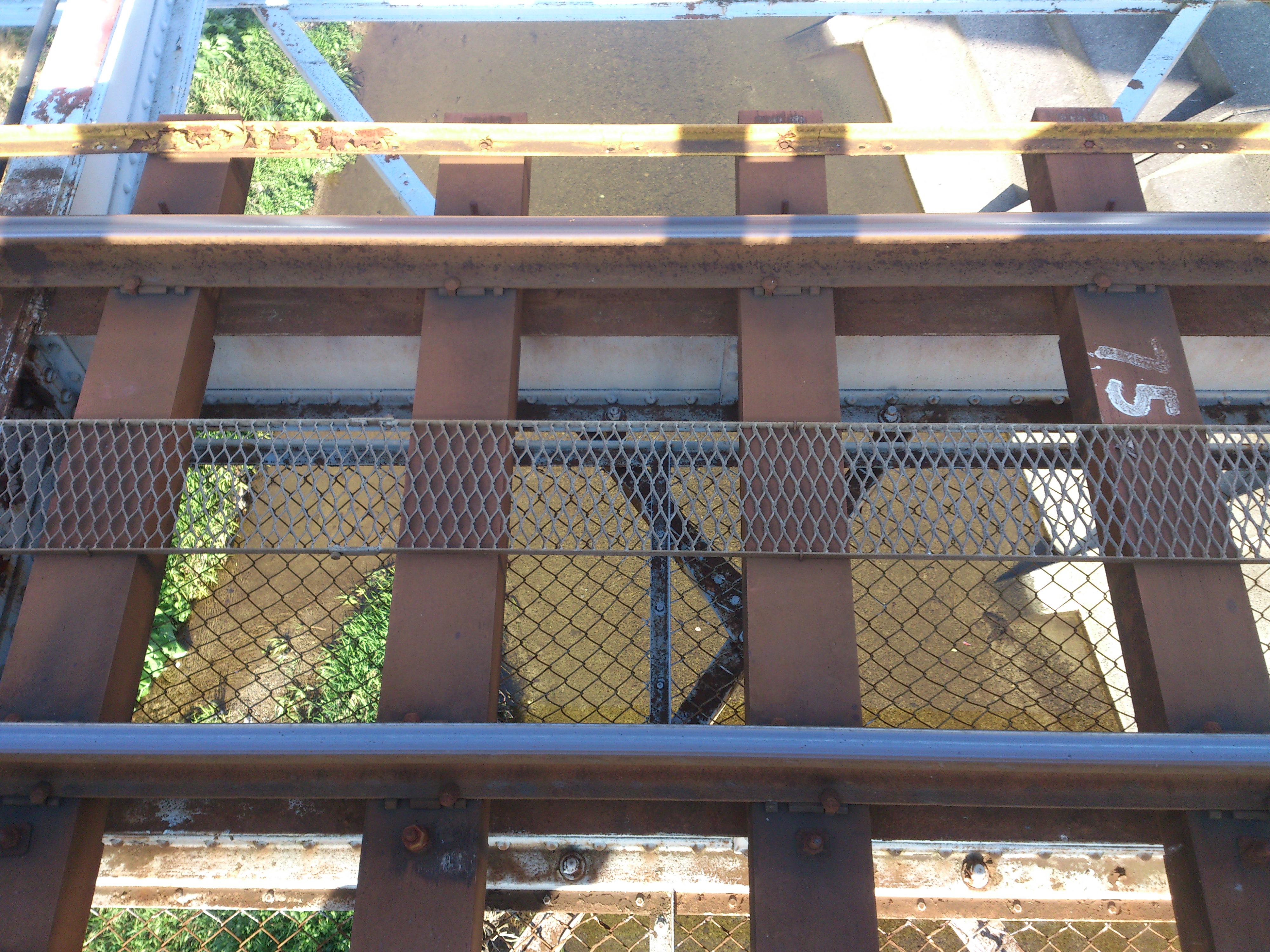 石手川公園駅 ホームから見た川面